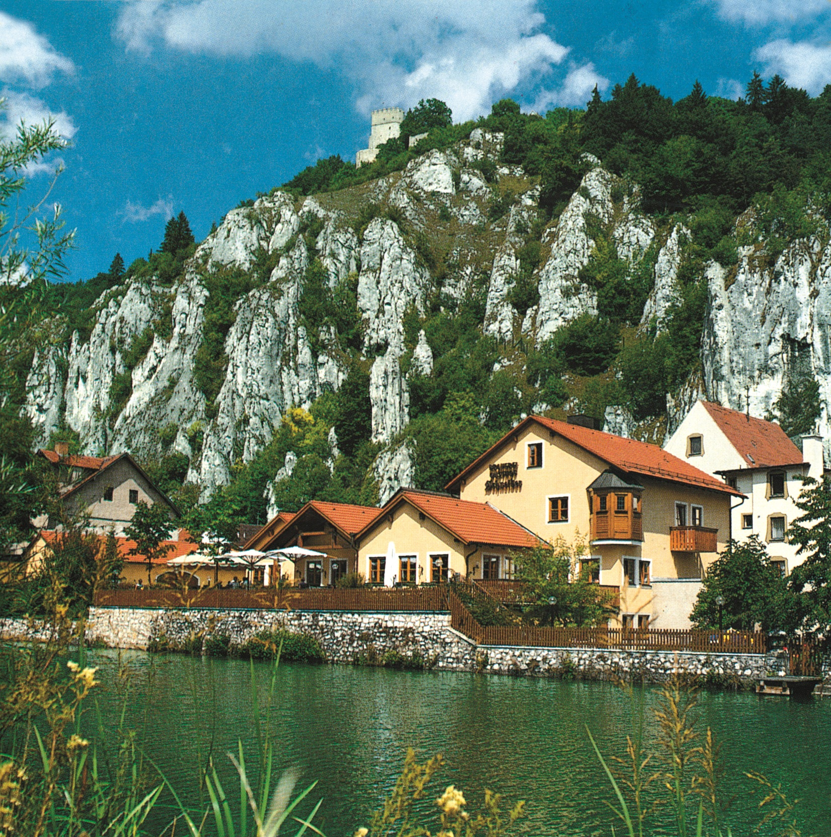 Brauereigasthof Schneider